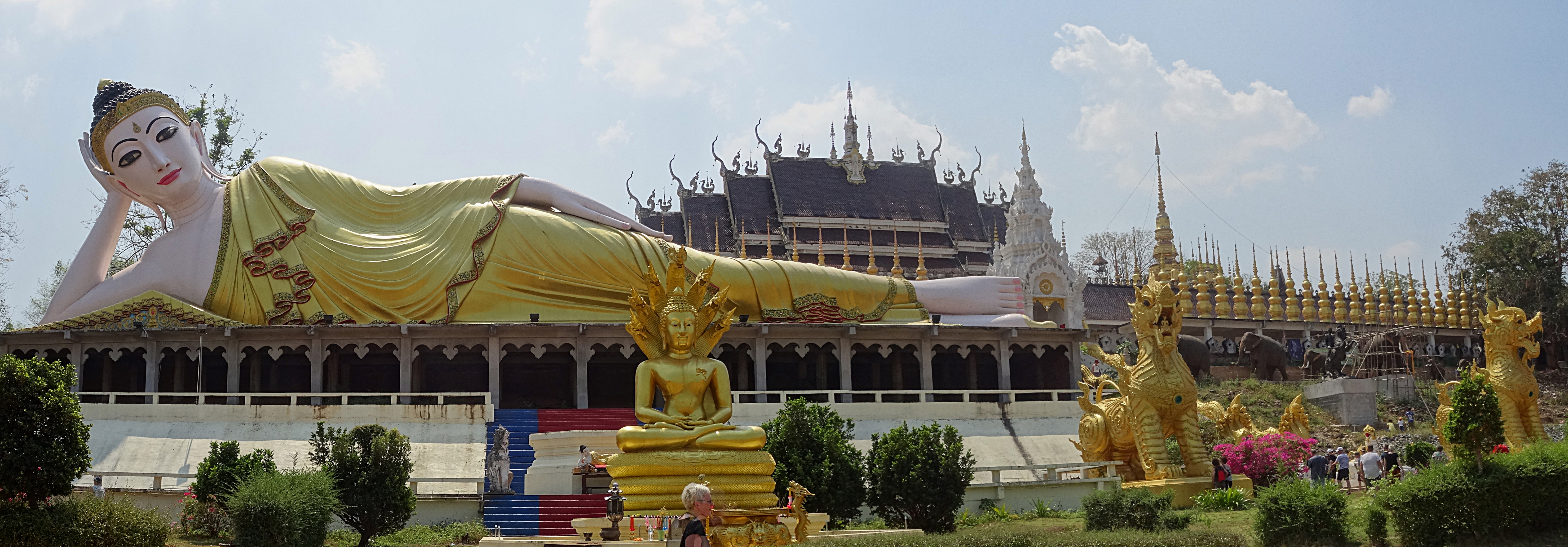 Liegender Buddha von Phrae (85 m lang) am Wat Phra That Suthon Mongkhon Khiri